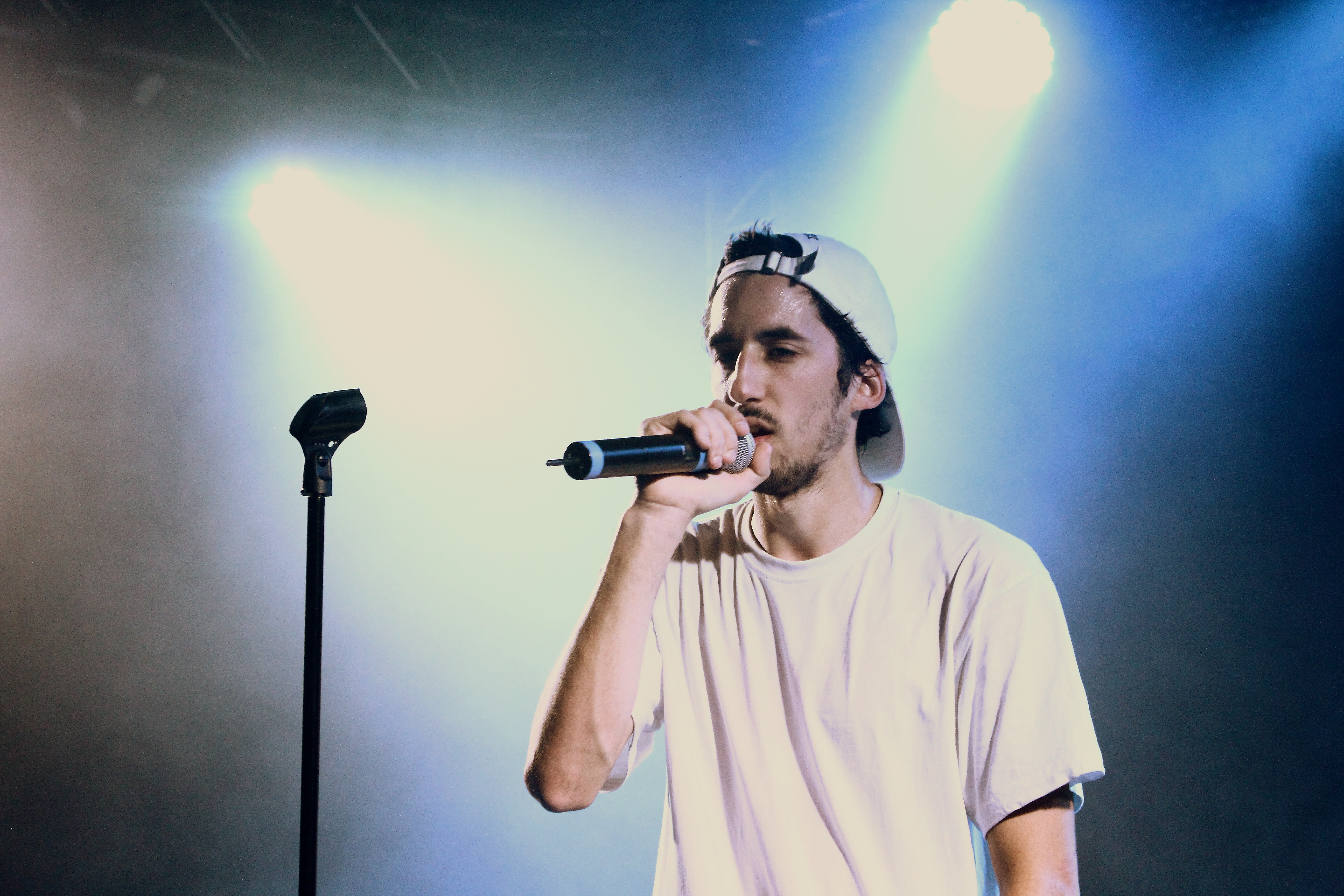 Lomepal à L'Astrolabe (Orléans)